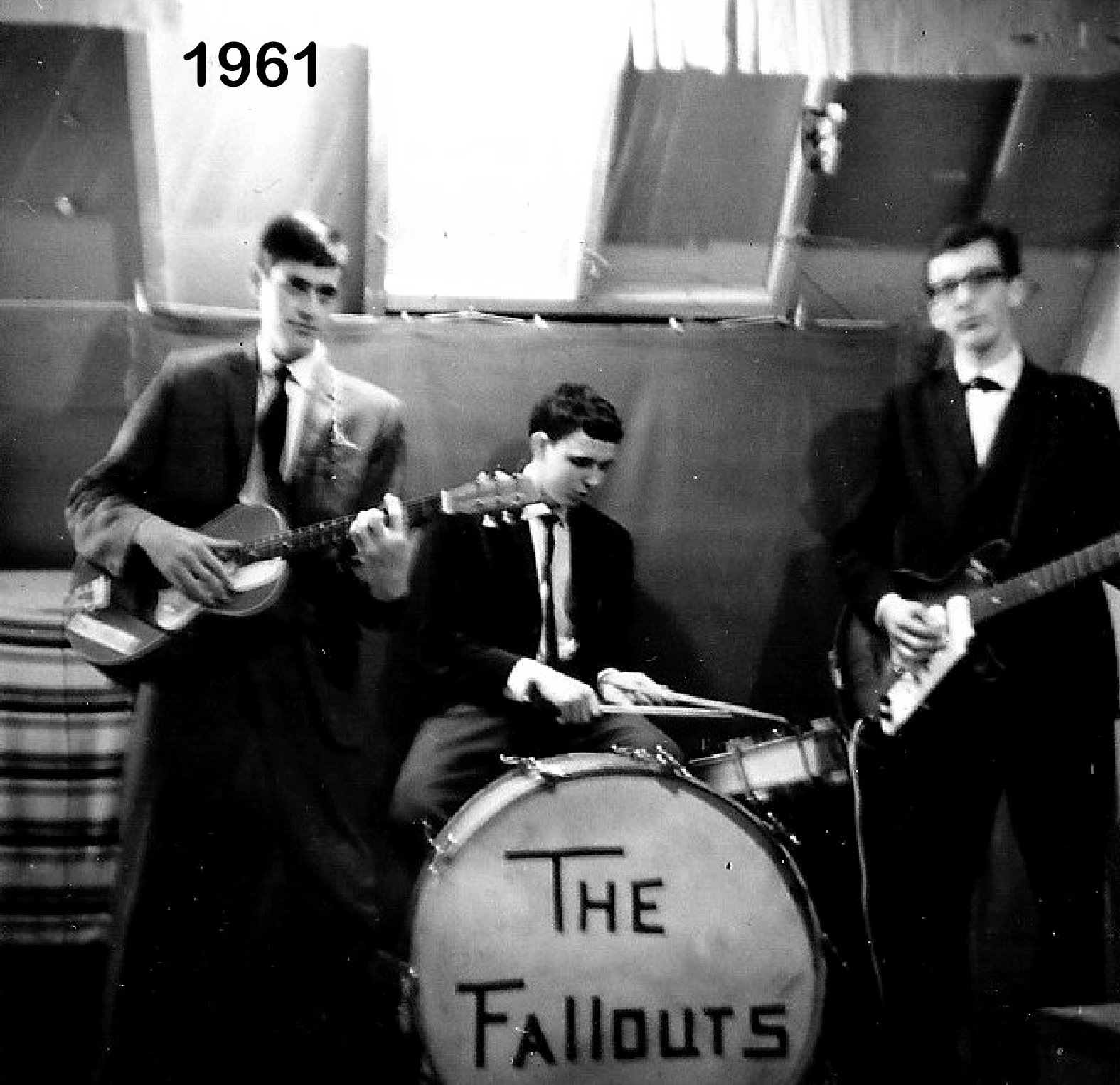 Repetitie op zolder van Deken Frankenstraat Valkenswaard.